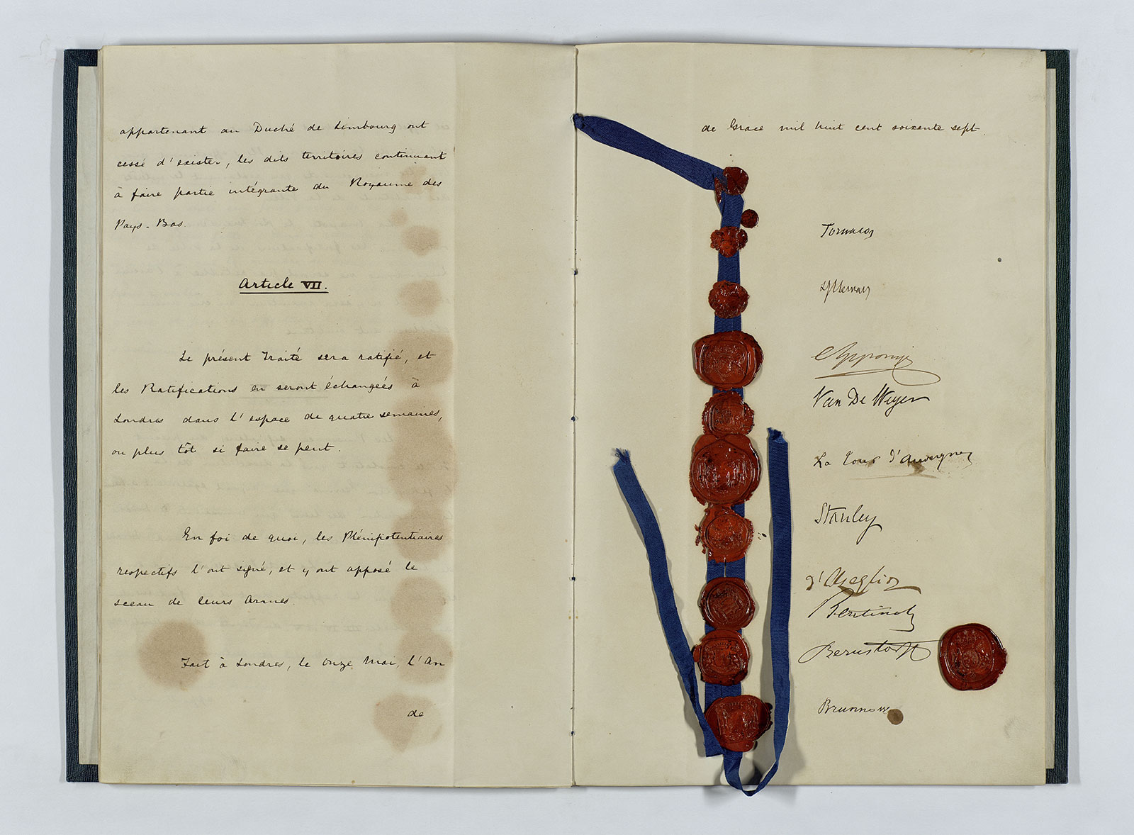 Traité de Londres (1867), acte final et procès-verbal d'échange.